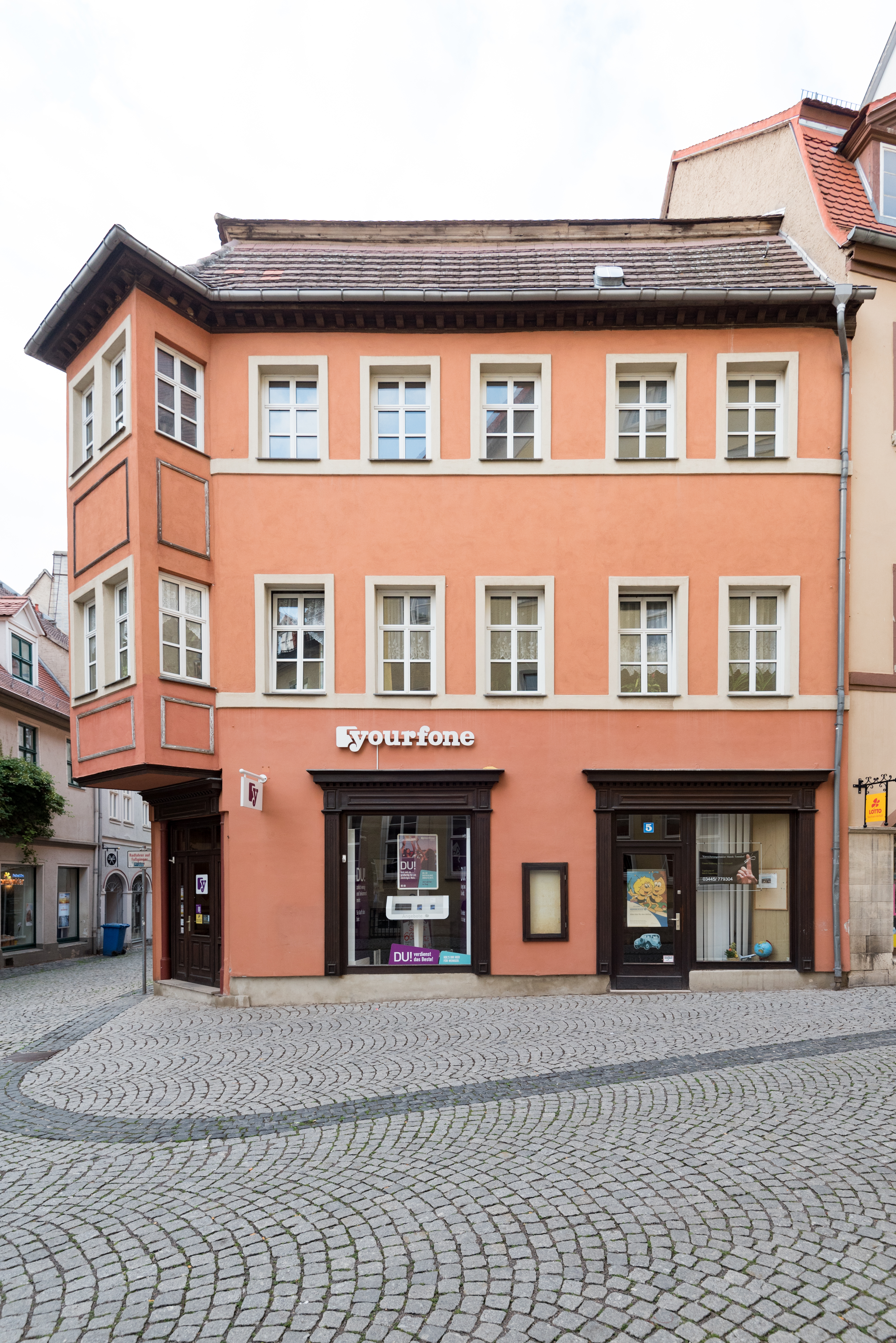 Naumburg (Saale), Topfmarkt 5